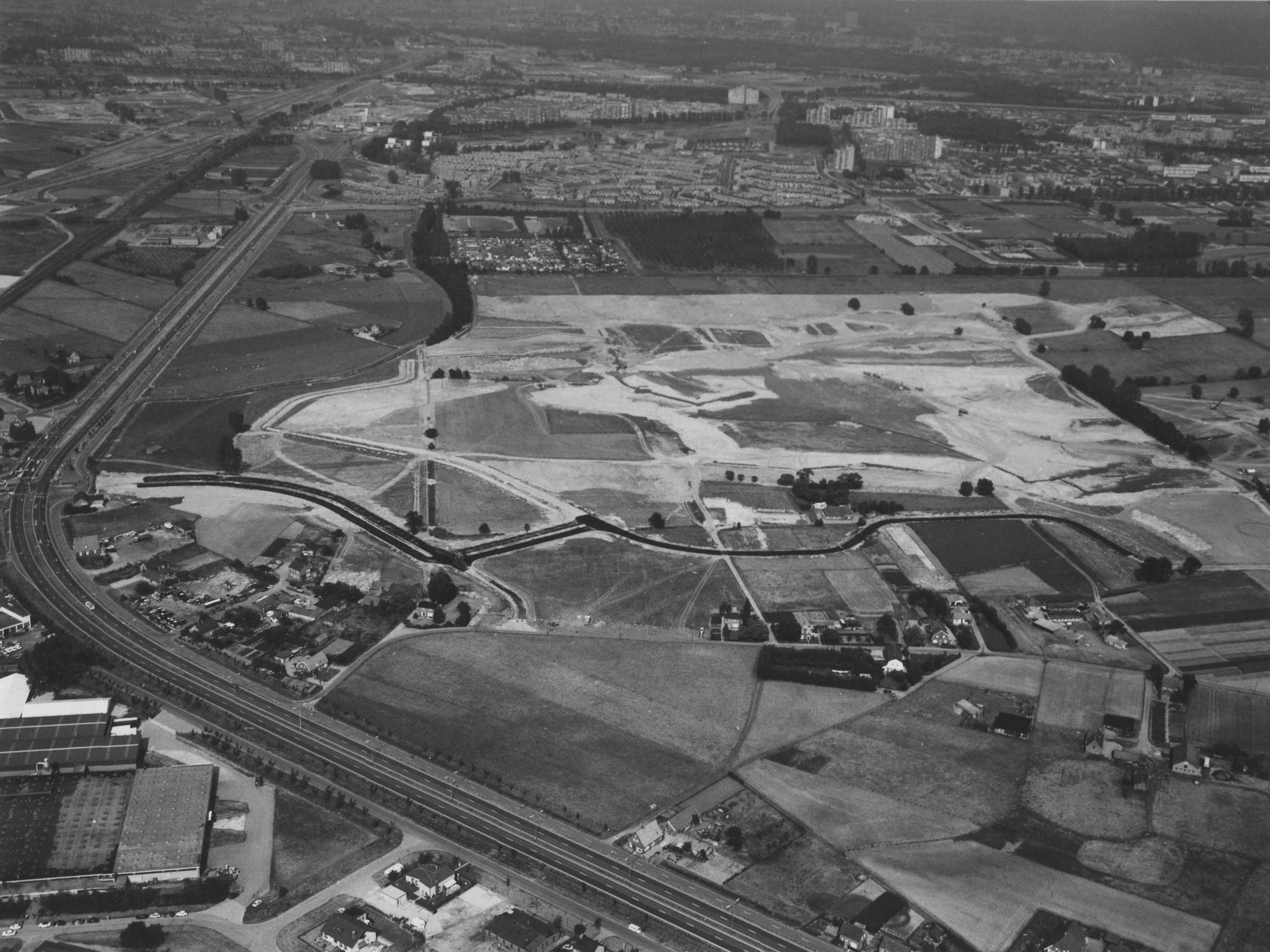 De Berendonck in aanleg, 8 juli 1976 ; op de achtergrond liggen Staddijke en Dukkenburg